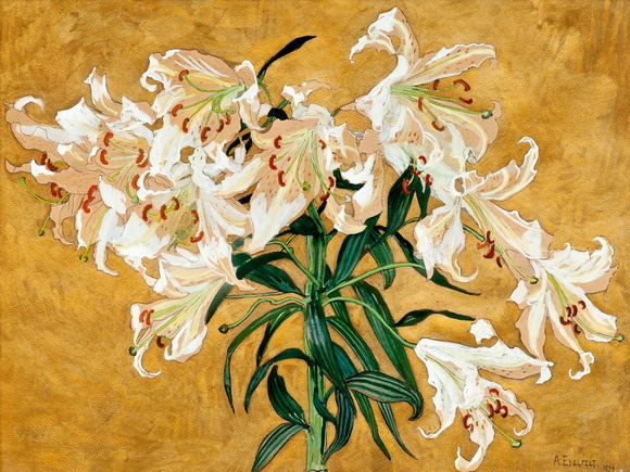 Лілії, квітковий натюрморт